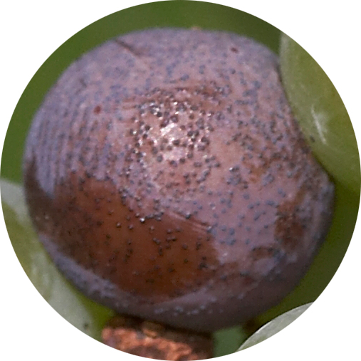 Schwarzfäule der Rebe